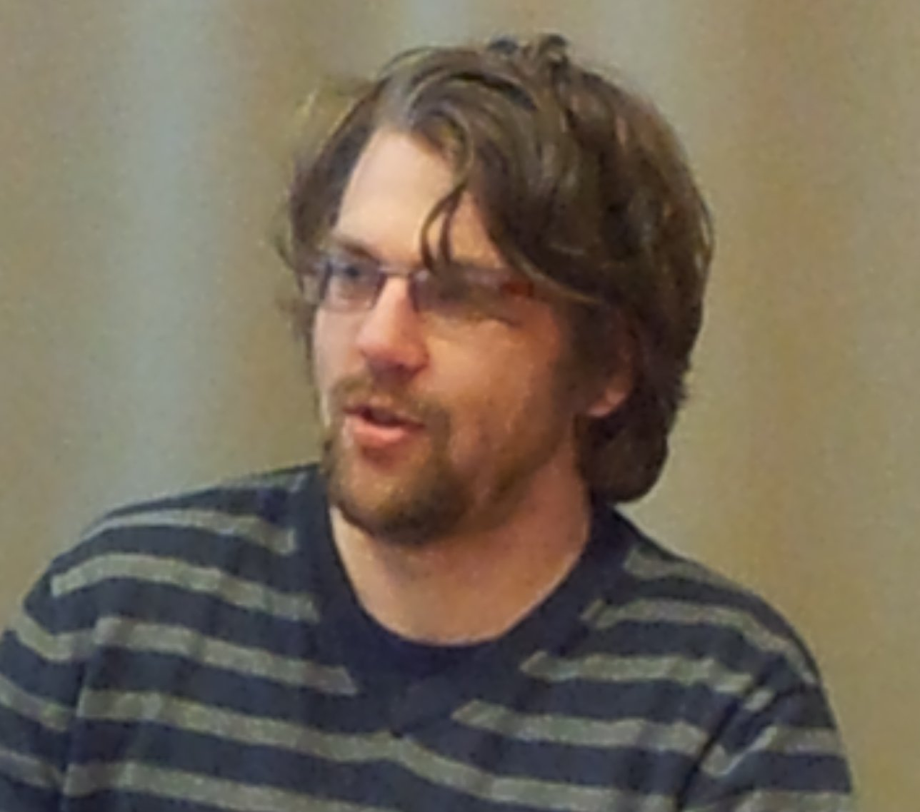 Øyvind Strømmen